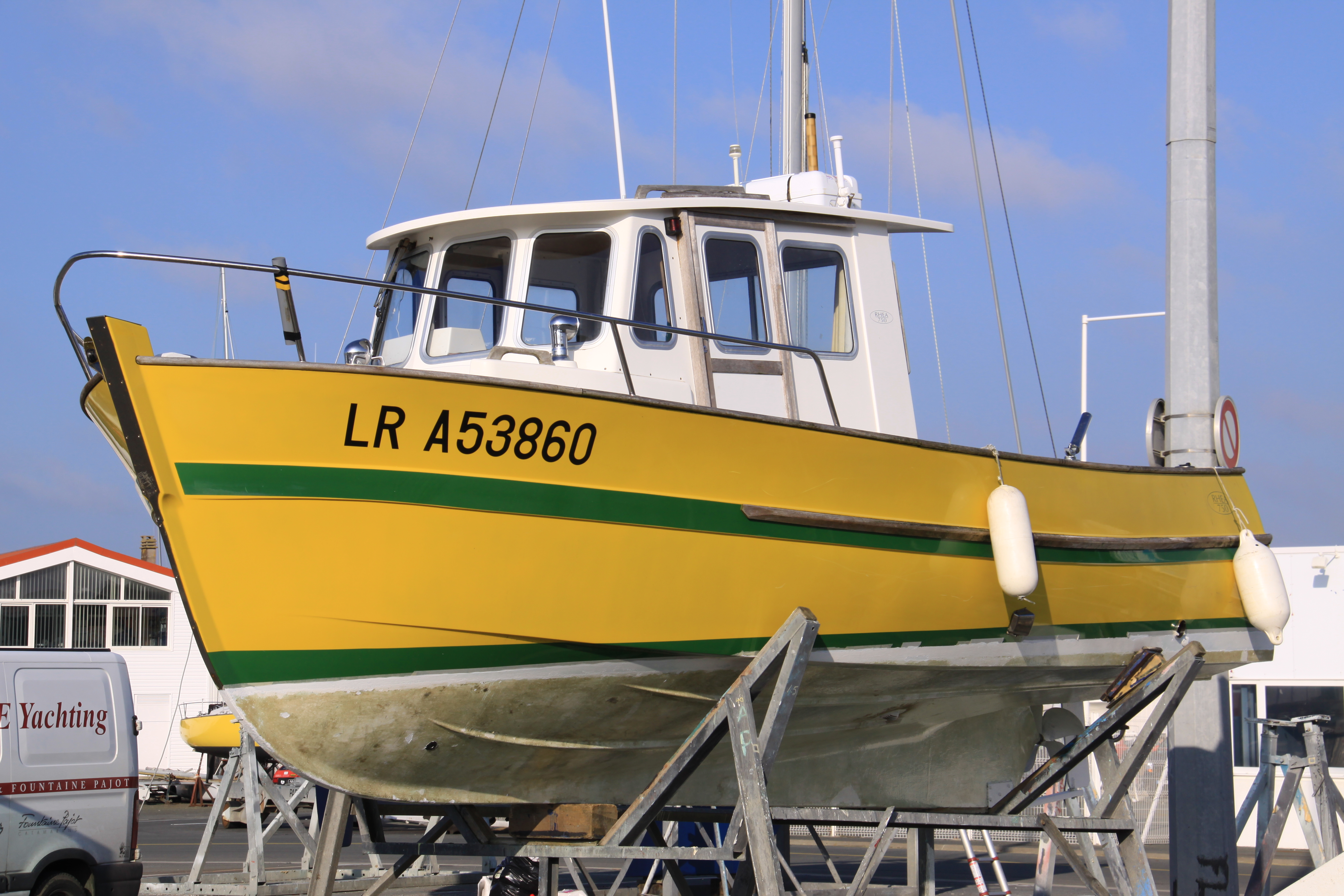 Un bateau de plaisance pour la pêche de loisir et la promenade sur cale sèche. Ce bateau (vedette) de plaisance est un Rhea 750 Timonier construit par Rhea Marine. La longueur de sa coque est de 7,50 mètres. Il est équipé d'un moteur de 250 CV. Port des Minimes, La Rochelle, Charente Maritime, France.